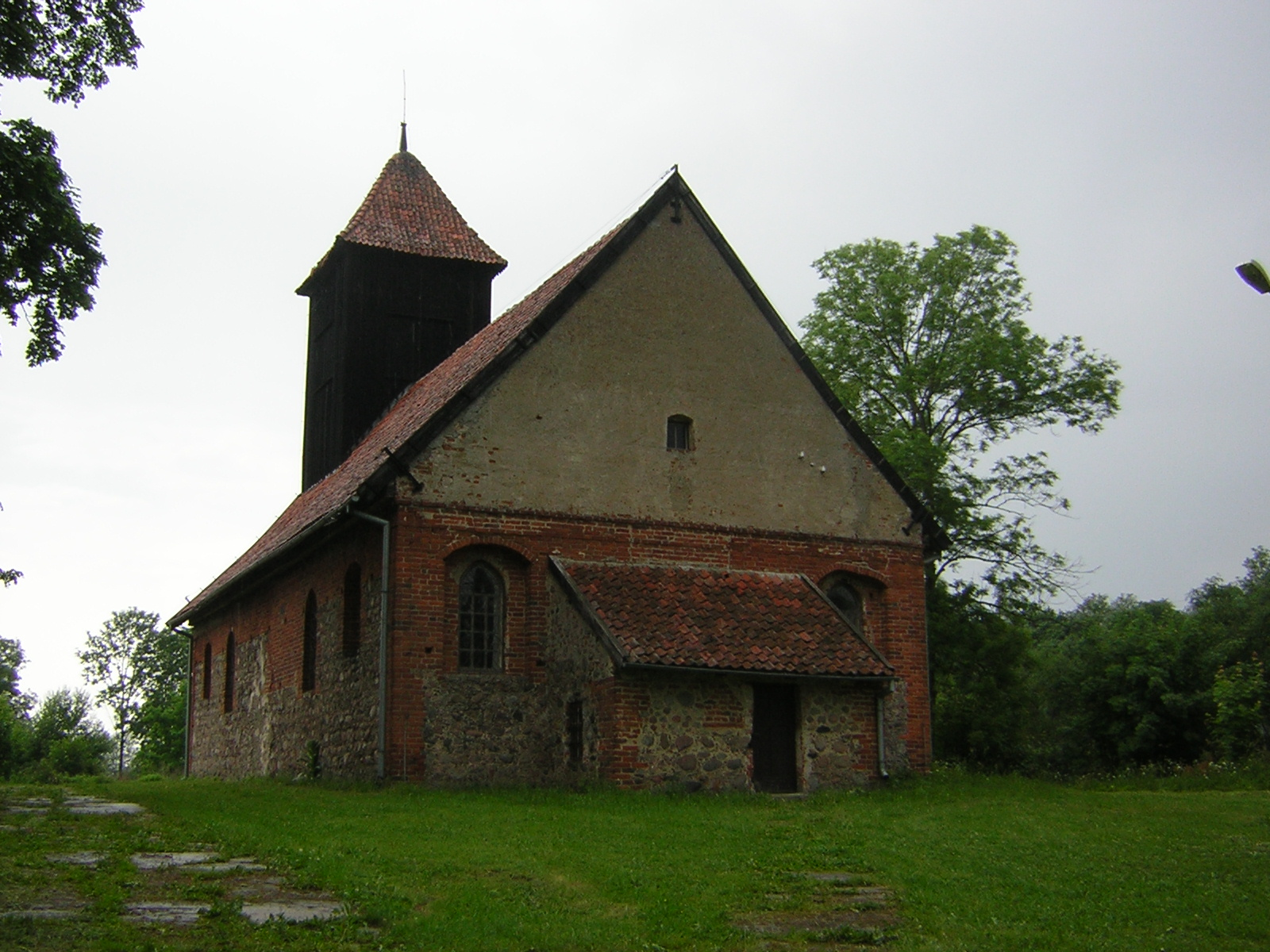 Leszcz - rzymskokatolicki kościół filialny p.w. Świętej Trójcy wraz z cmentarzem przykościelnym, kon. XIV, XVIII, 1974-1977